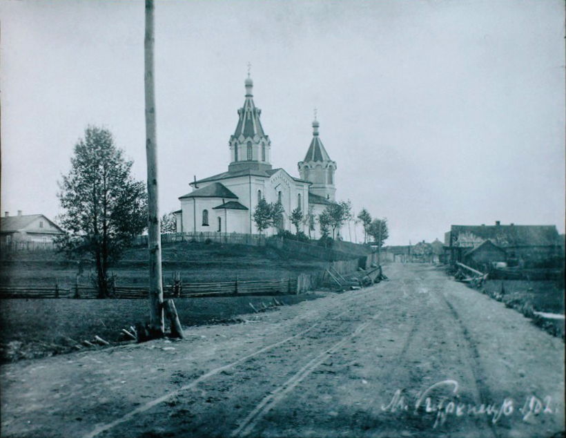 Беларуская (тарашкевіца): Куранец (Kuraniec). Царква-мураўёўка